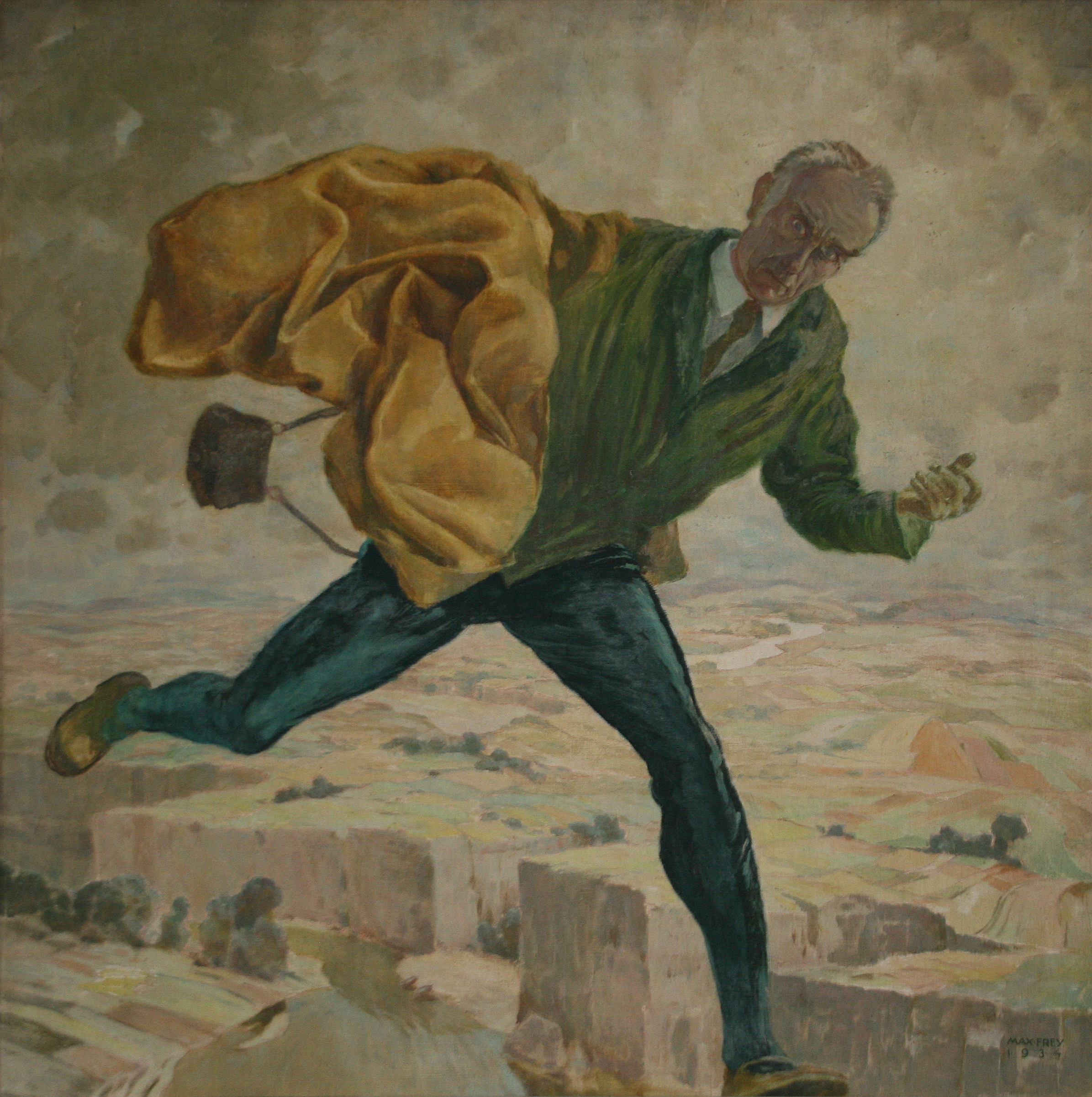 Max Frey (1874-1944): [Selbstportrait] Weiter! Aufwärts! 1934. Öl auf Hartfaser. 70cm x 70cm